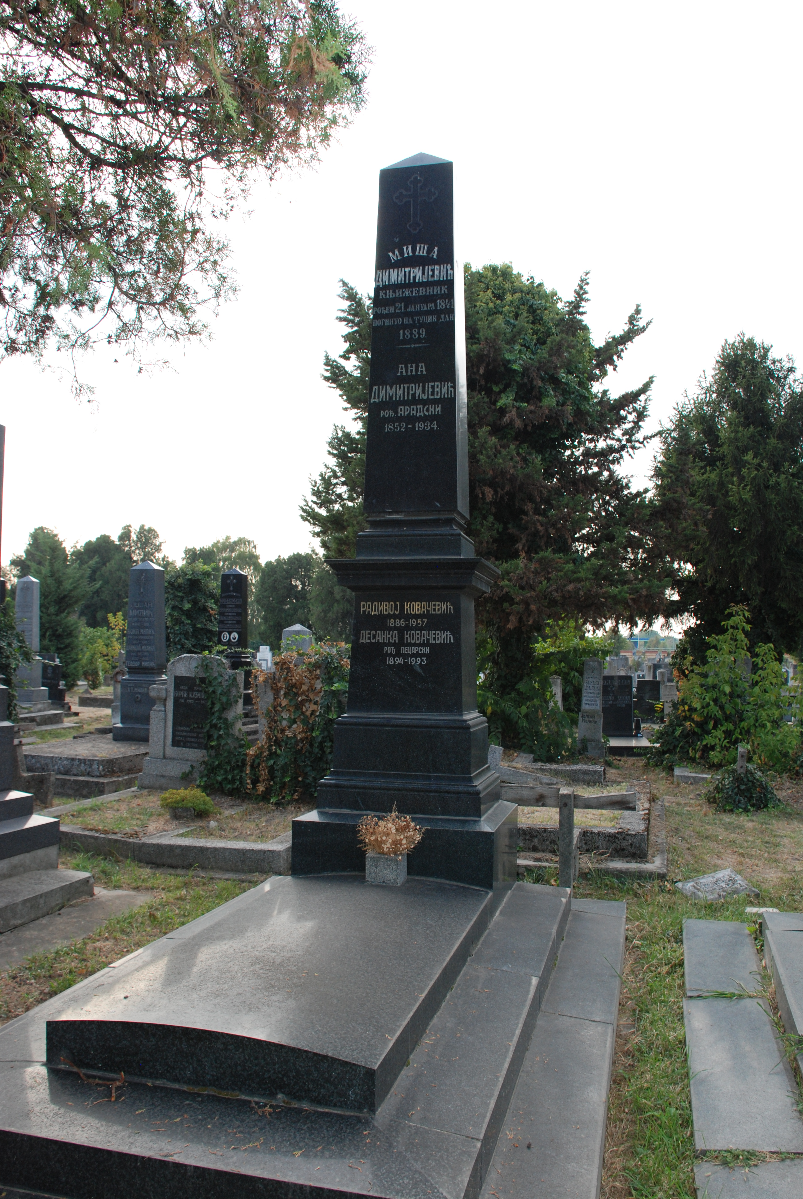 1841-1889, публициста и политичар, један од првака народне странке, оснивач и главни уредник Браника, један од најближих сарадника Светозара Милетића, када се Милетићева Народна странка распала пришао либералима и постао један од најистакнутијих вођа, секретар Главног одбора УОС